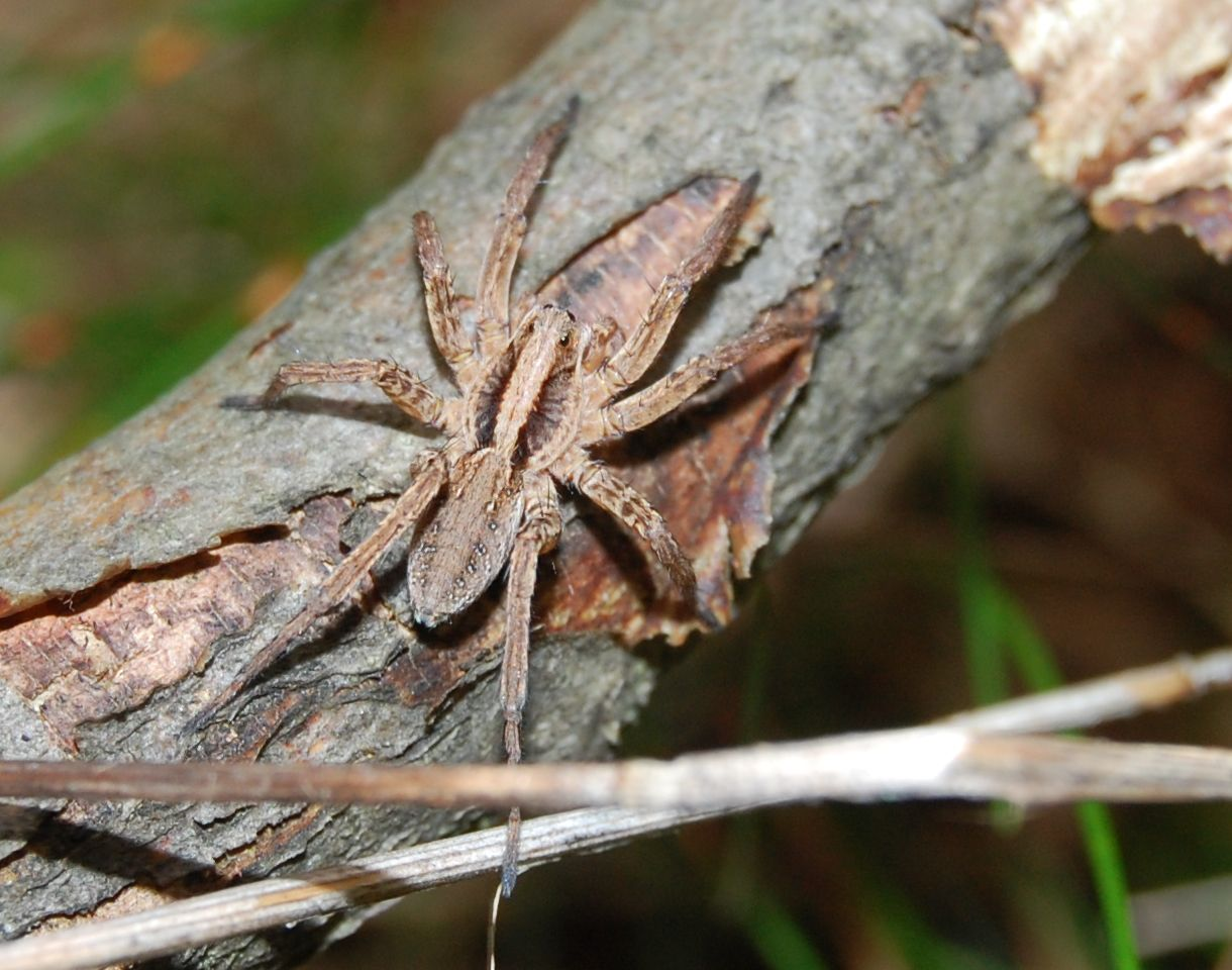 Alopecosa trabalis, female